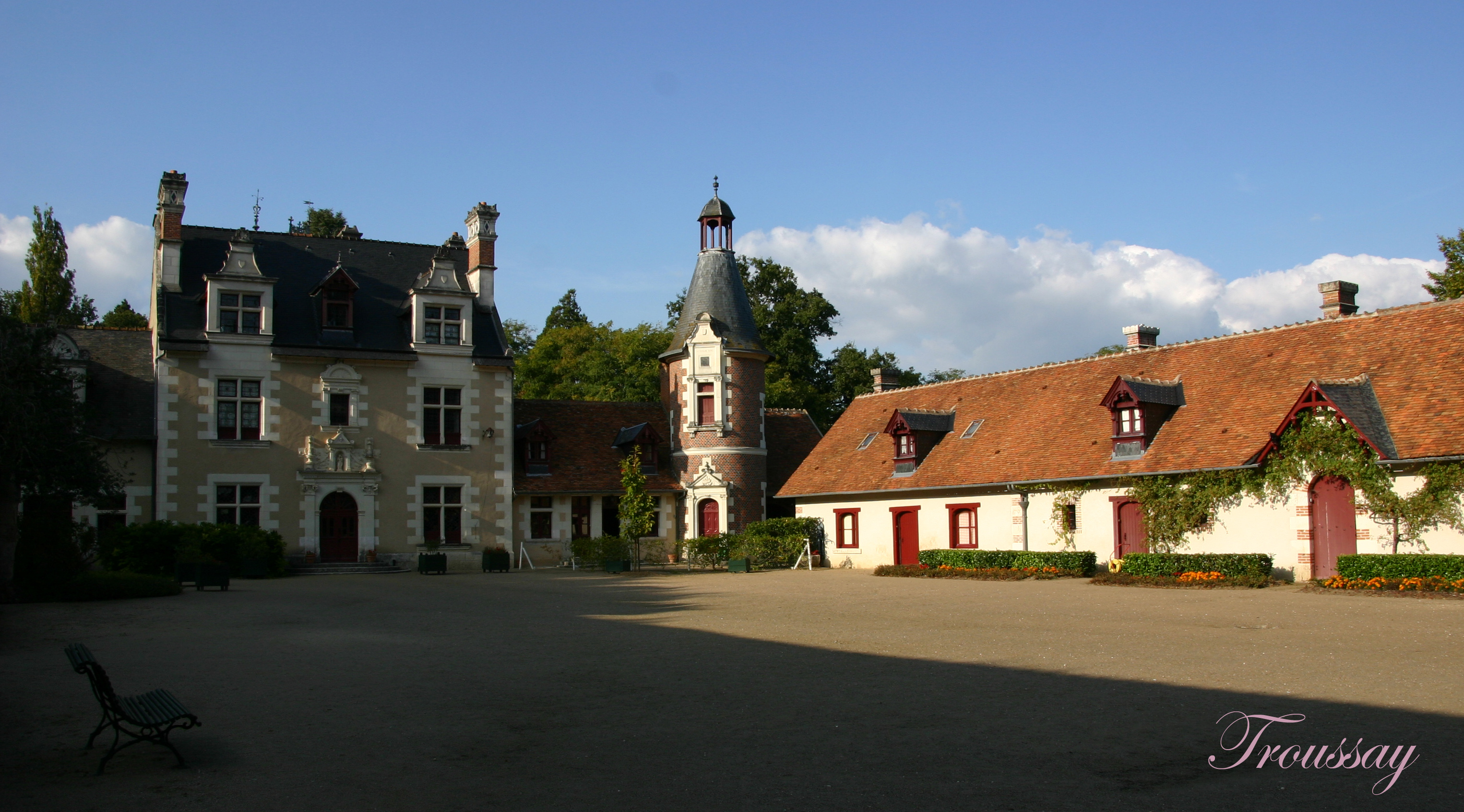 Schloss Troussay